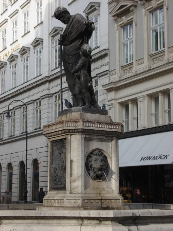 Grabenbrunnen in Wien